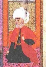 AşıkÇelebi'nin Meşairu's suara adli eserinde Semsi Ahmed Paşa'nin tasvirinin bulundgu sayfa (Millet Kütüphanesi, AliEmin Efendi, Tarih, nr. 772, vr. 658')